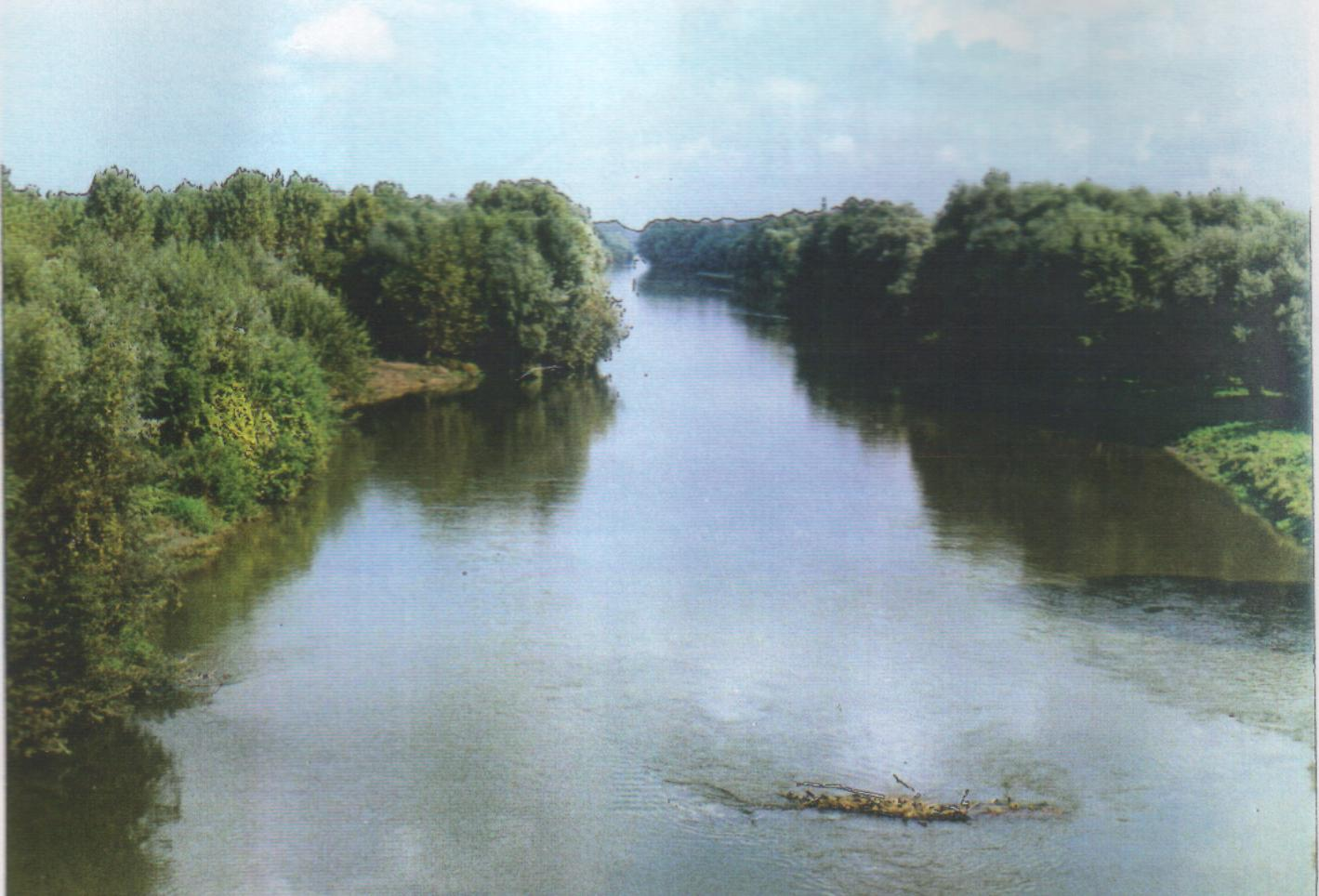 A Rába folyó Rábapatonánál